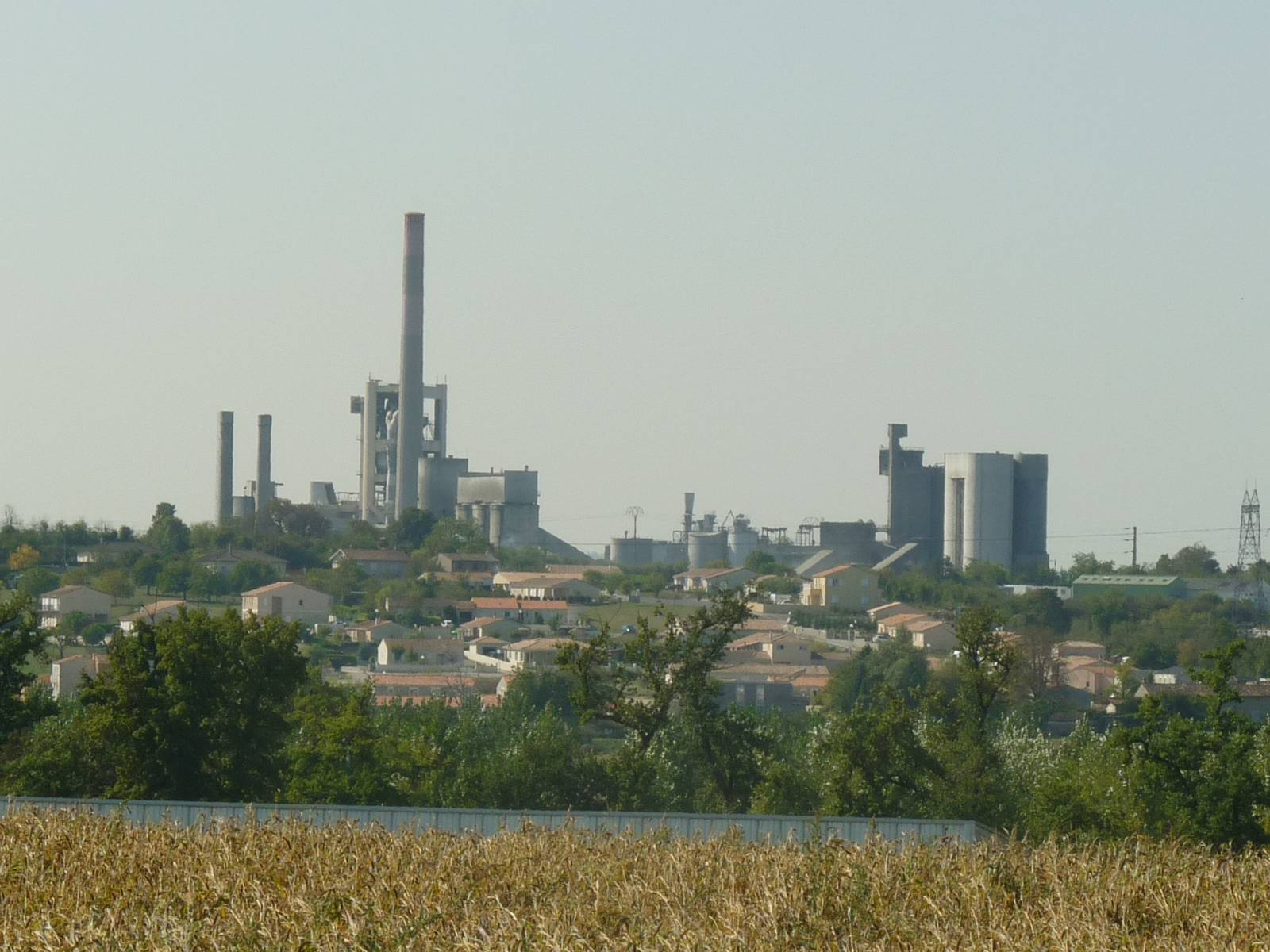 La Couronne (16, France) et la cimenterie Lafarge vus de Breuty